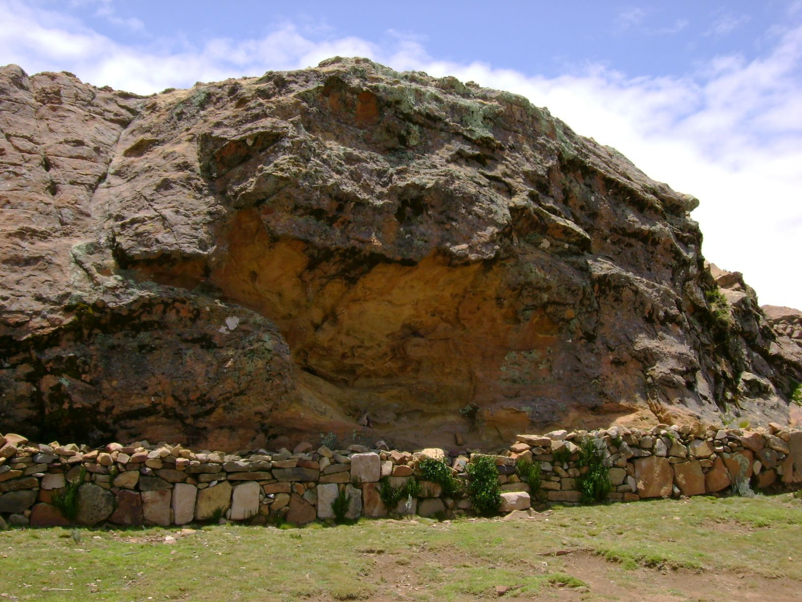 Foto tirada por mim, na Isla del Sol.